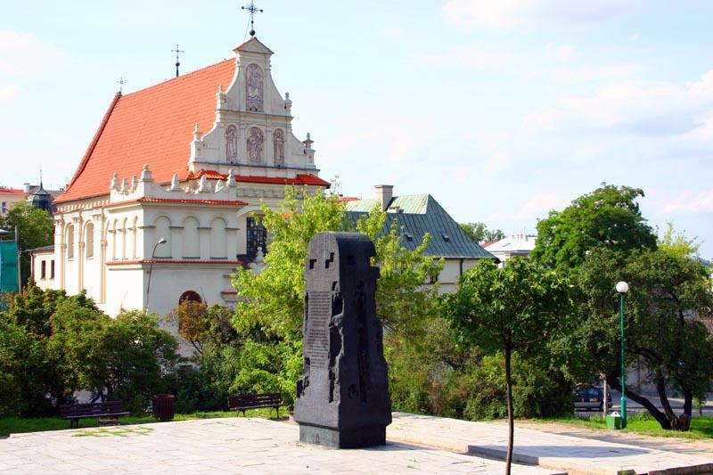 Lublin kościół św. Józefa (karmelici)